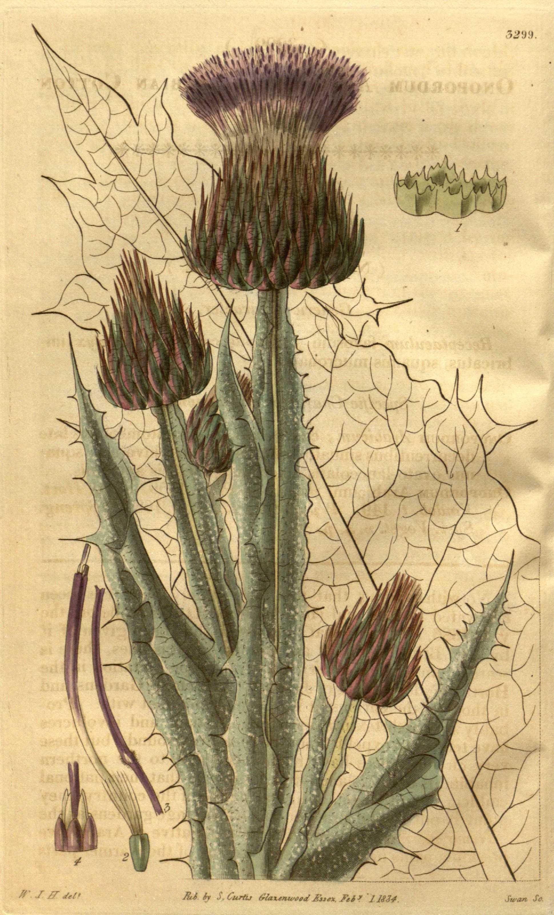 3299. -1 Tiii iy yCurlu (rlaxenwetd Jhiex J"ei " 118.14. Swan. St!